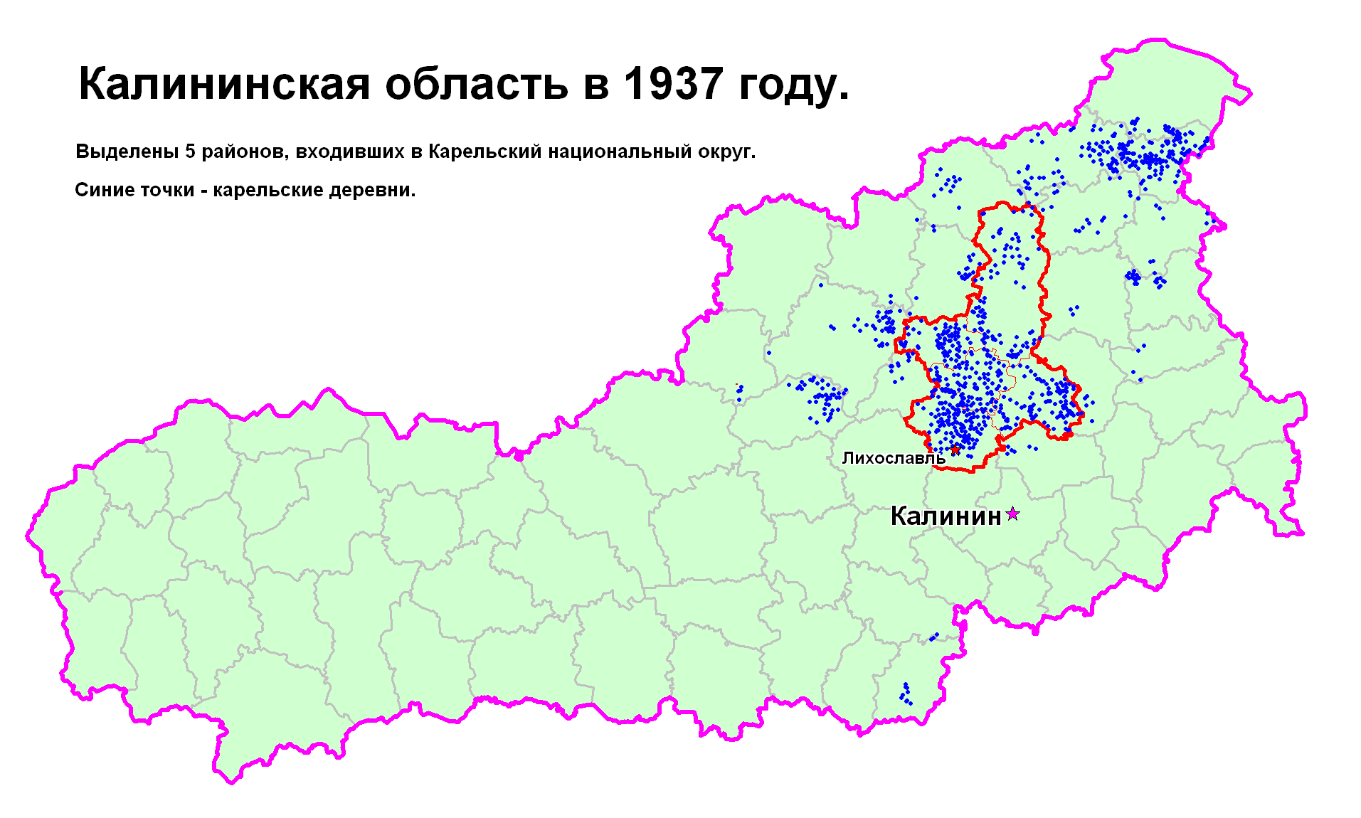 Калининская область в 1937 году. Выделены районы Карельского нац.округа